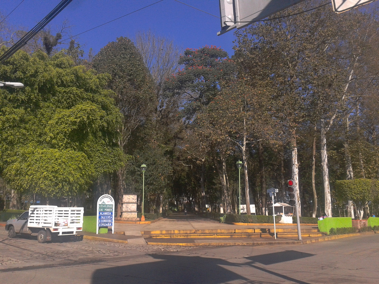 Paseo Agustín Chiellar